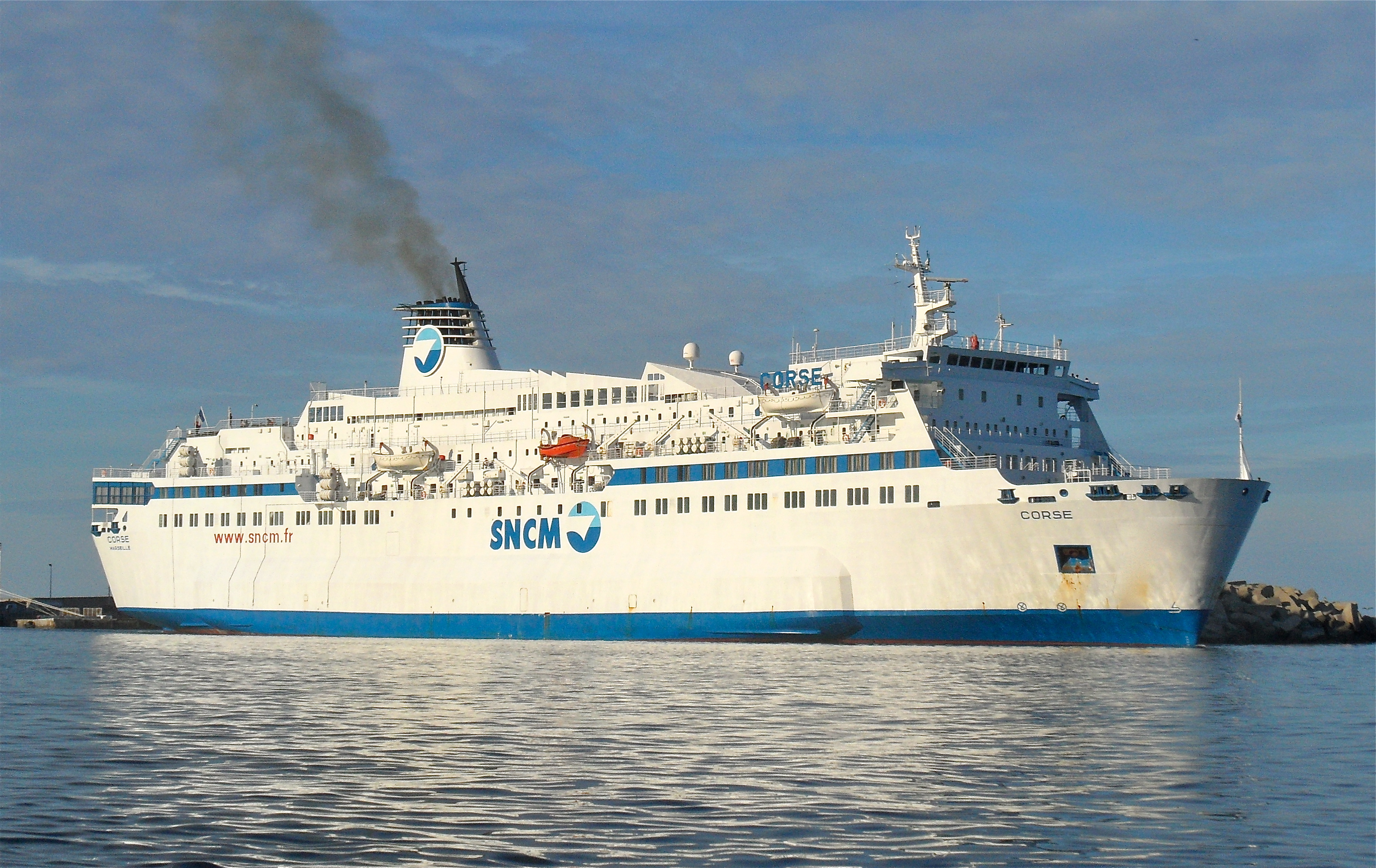 le Corse (SNCM)